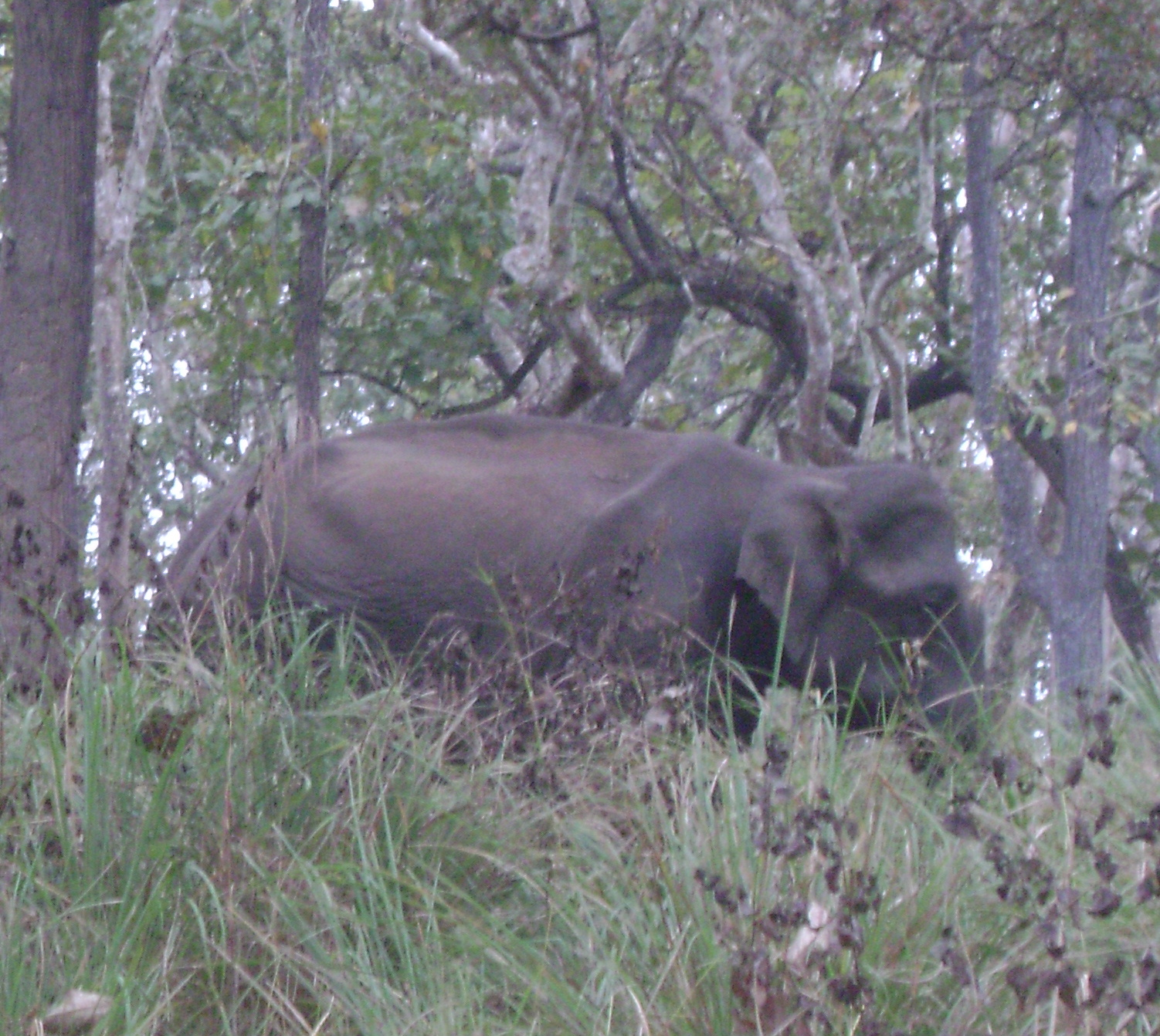 Indian Elephant at Mudumalai National Park